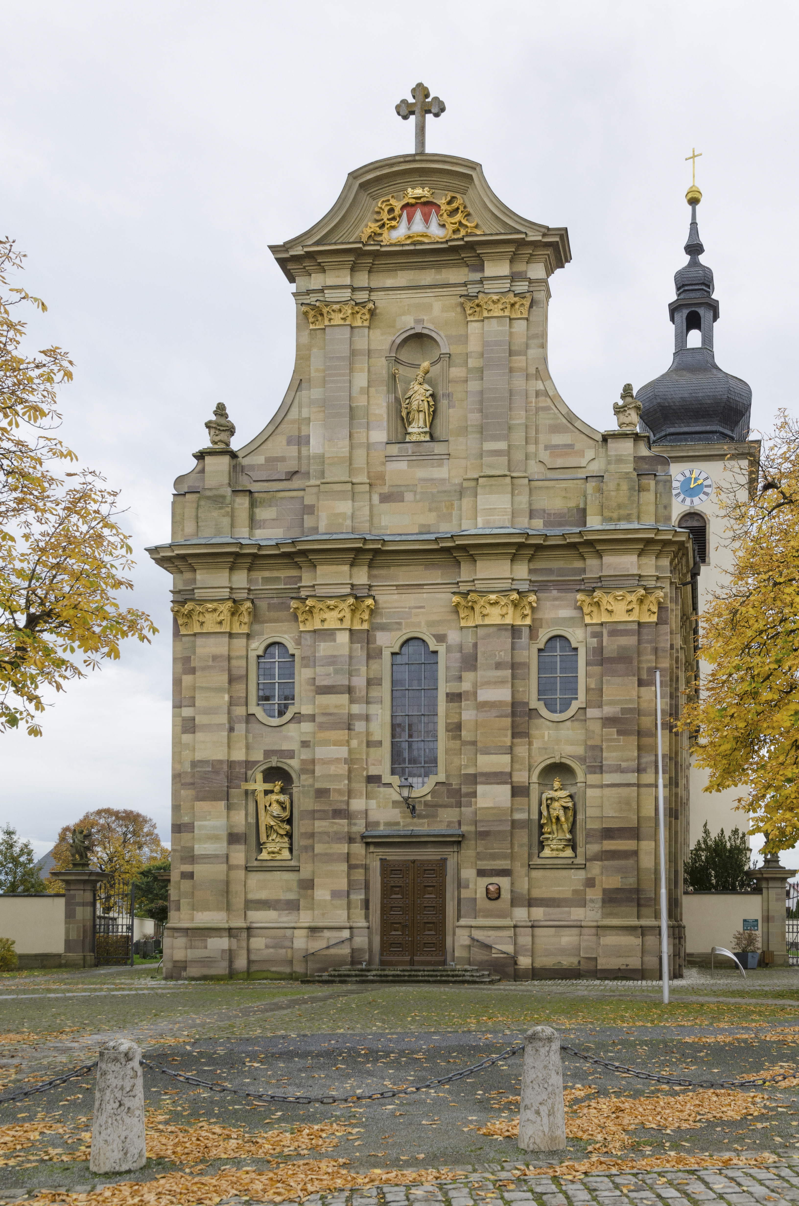 Grafenrheinfeld, Katholische Pfarrkirche Kreuzauffindung